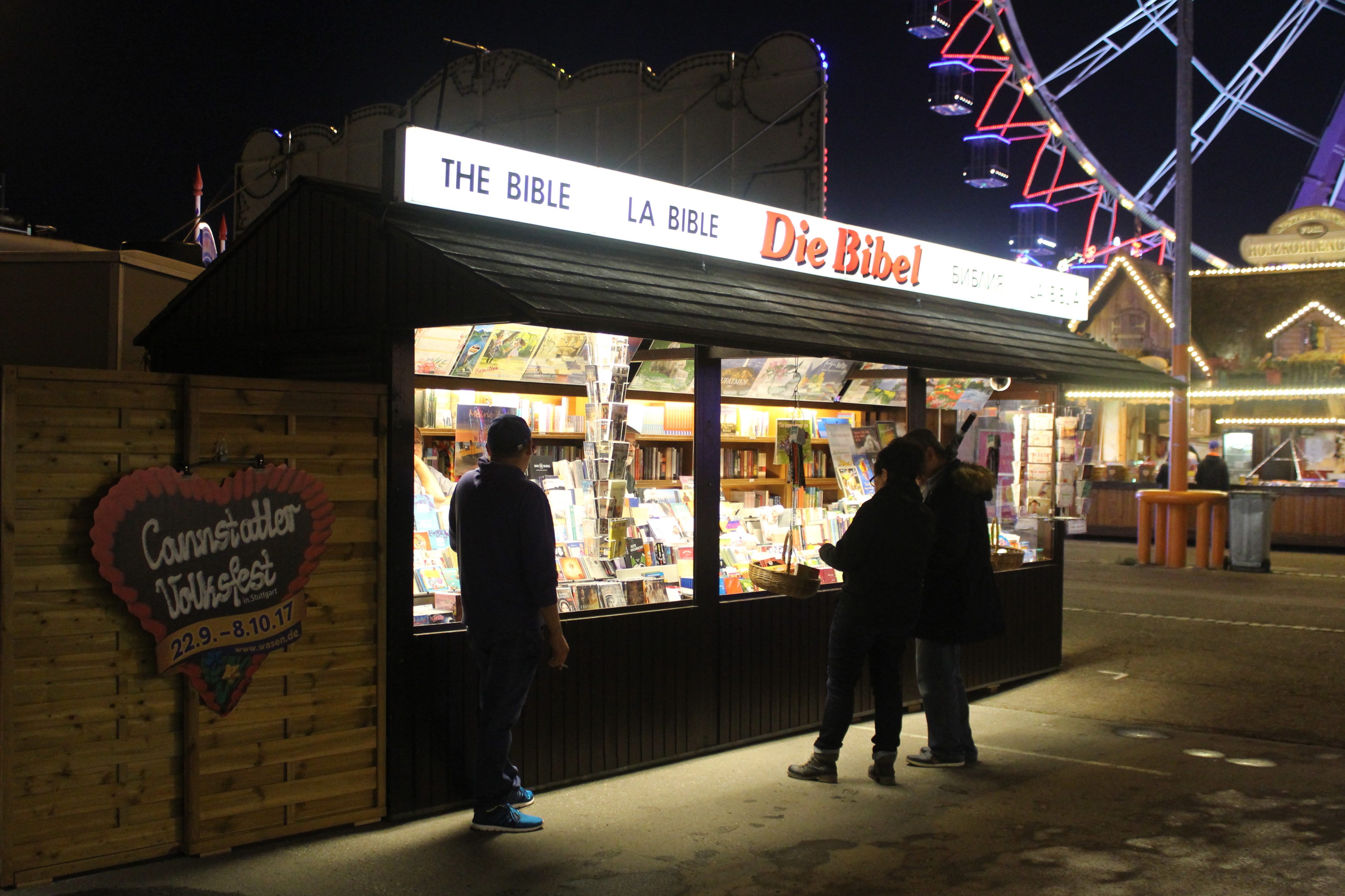 Bibelstand auf dem Cannstatter Volksfest 2017